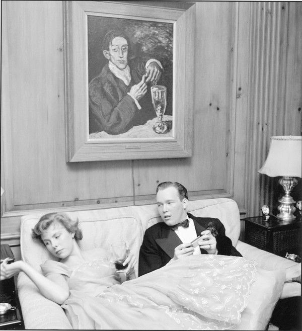 Բեթսի վոն Ֆուրսթենբերգ` ետևի պլանում Պաբլո Պիկասոյի՝ Անխել Ֆերնանդես դե Սոտոյի դիմանկարը